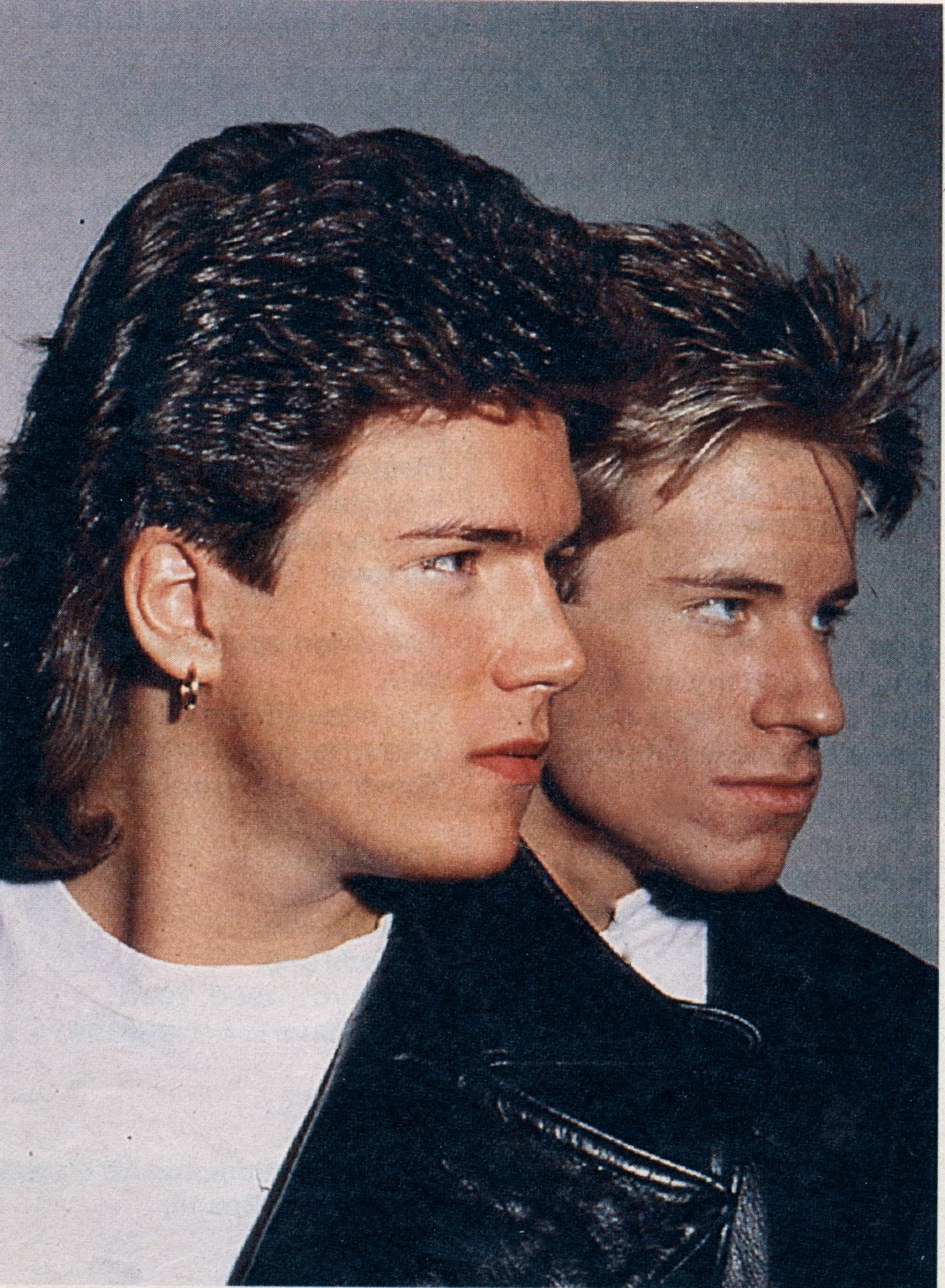 So What